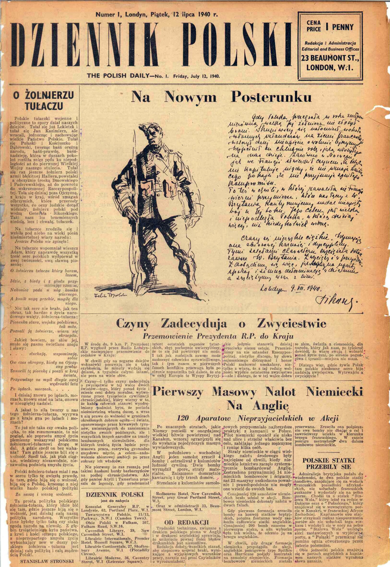 Pierwsza strona pierwszego numeru Dziennika Polskiego z 12 lipca 1940 r.